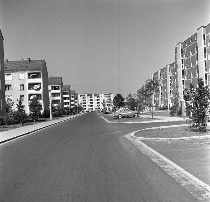 Wohnungsbau: Nürnberg-Langwasser